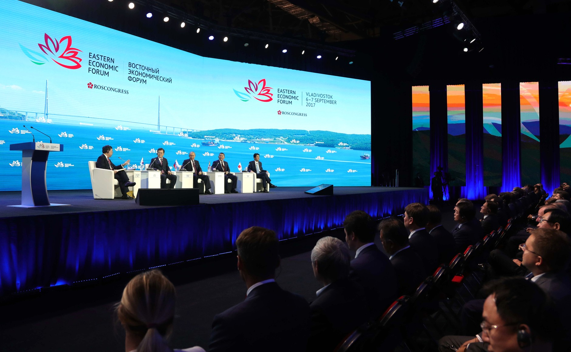 На пленарном заседании Восточного экономического форума.